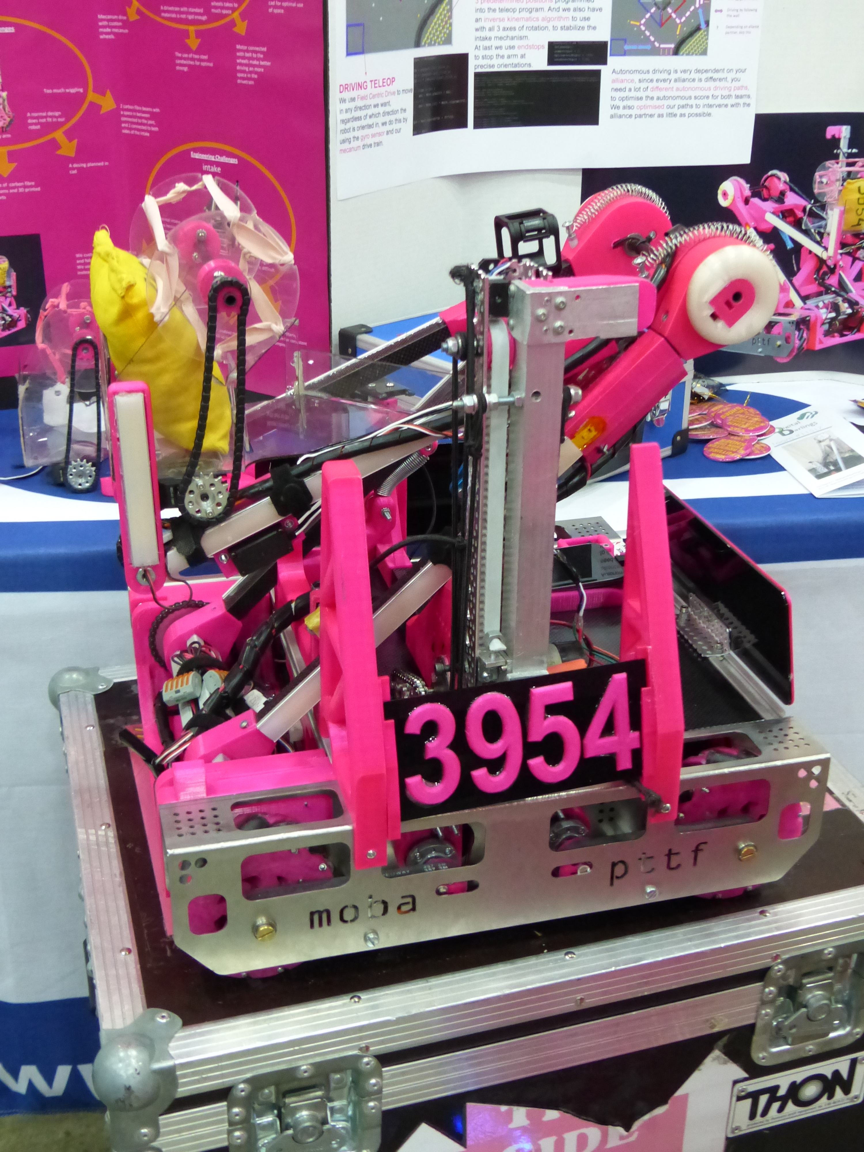 Einer der 160 von Jugendlichen konzipierten und gebauten Roboter, die im April 2019 an der FIRST Championship in Detroit in der Klasse FIRST Tech Challenge teilgenommen haben.